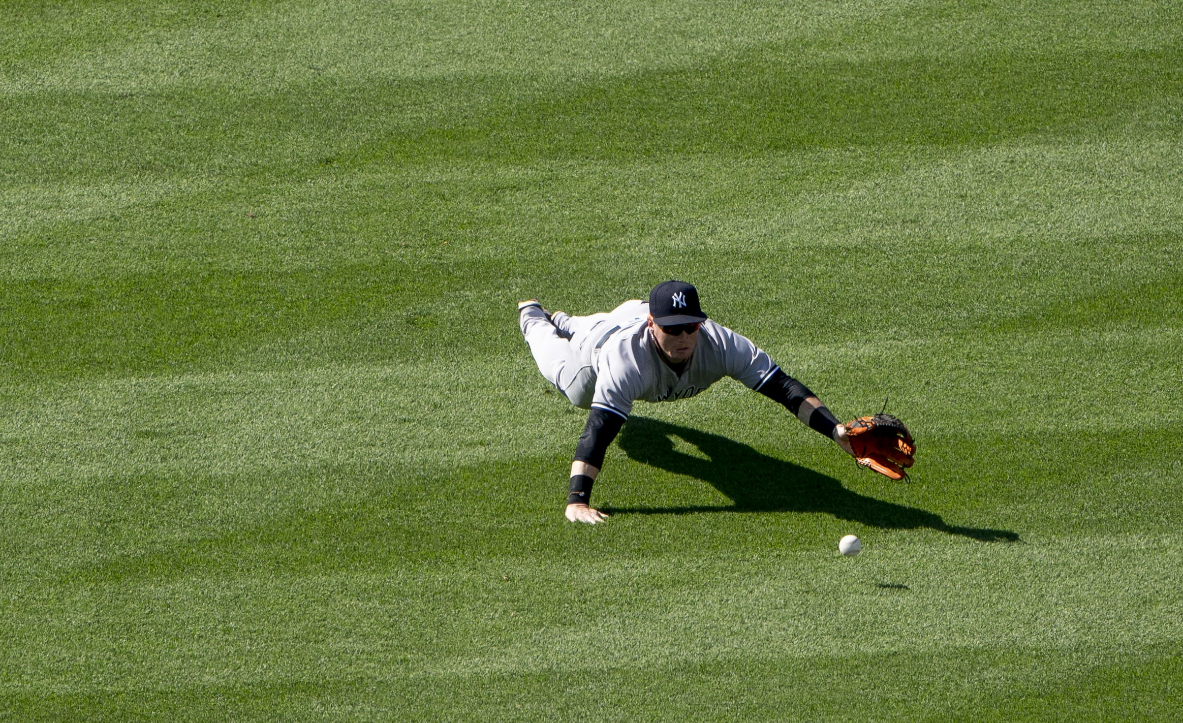 Yankees at Orioles 7/9/18